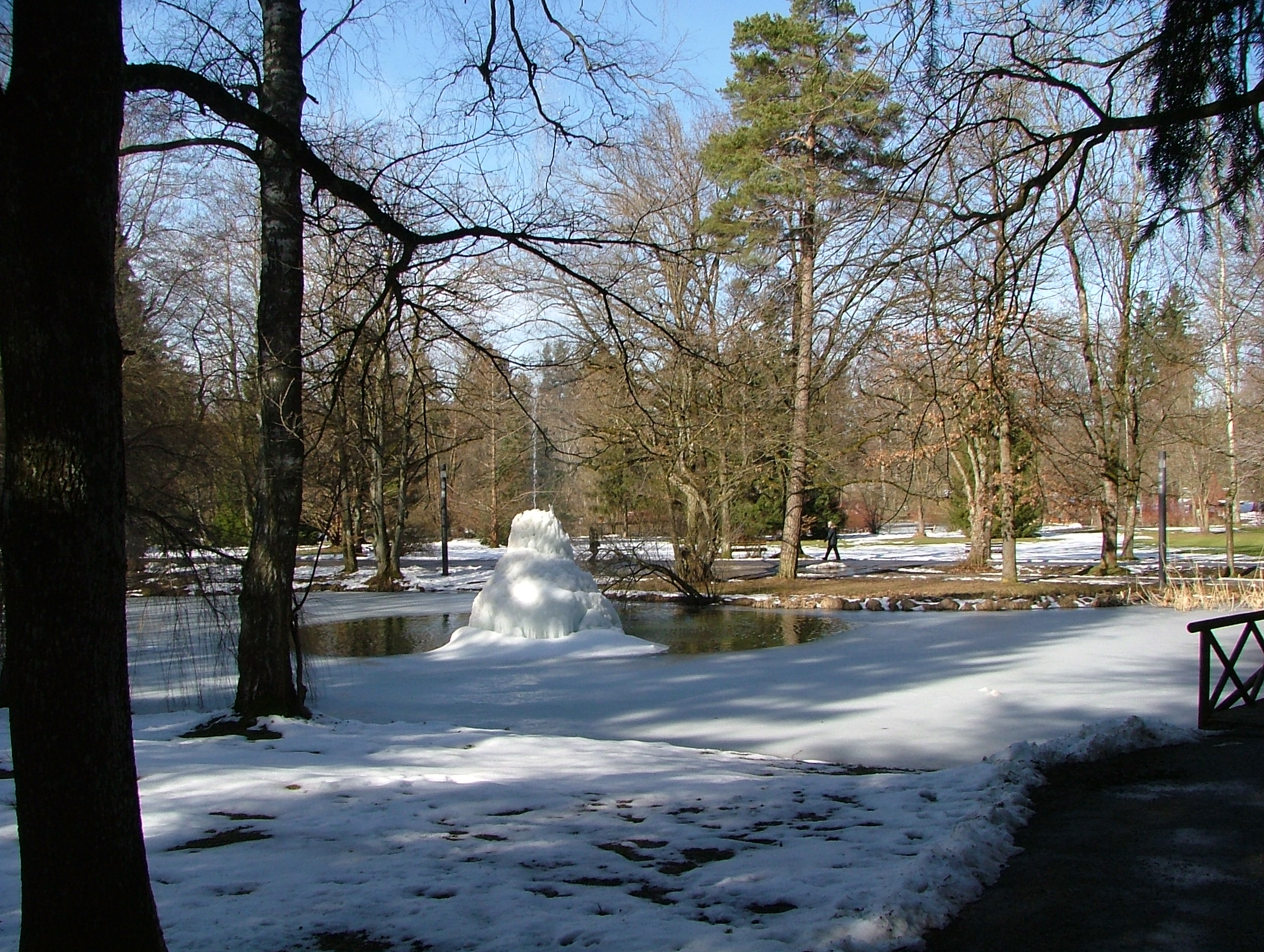 Kurpark